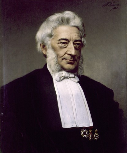 Friedrich Anton Wilhelm Miquel (1811-1871), Dutch botanist.